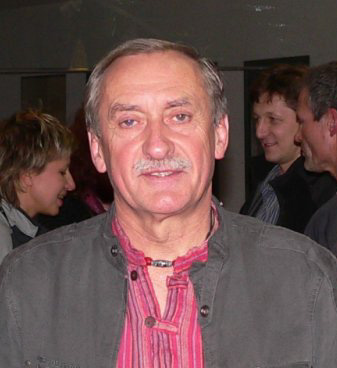 Портретна фотография на Кшищоф Велицки, полски алпинист.